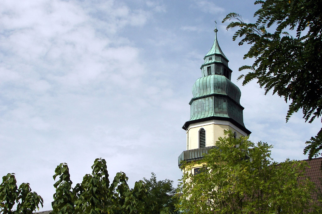 Herz-Jesu Kirche in Brambauer (NRW